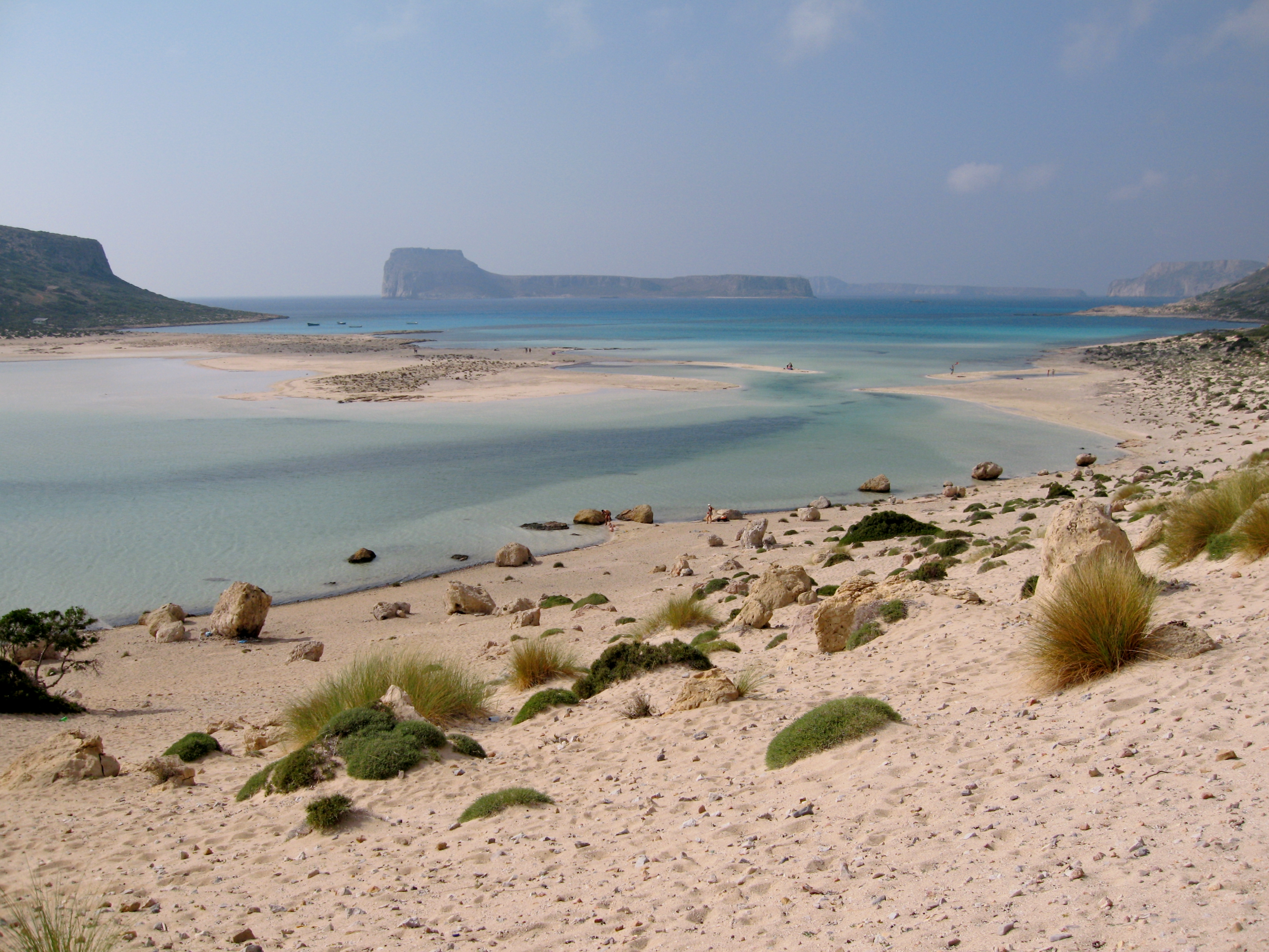 Bucht von Balos (Μπάλος) mit Blick auf Imeri Gramvousa ('Ημερη Γραμβούσα), Gemeinde Kissamos, Regionalbezirk Chania, Kreta, Griechenland